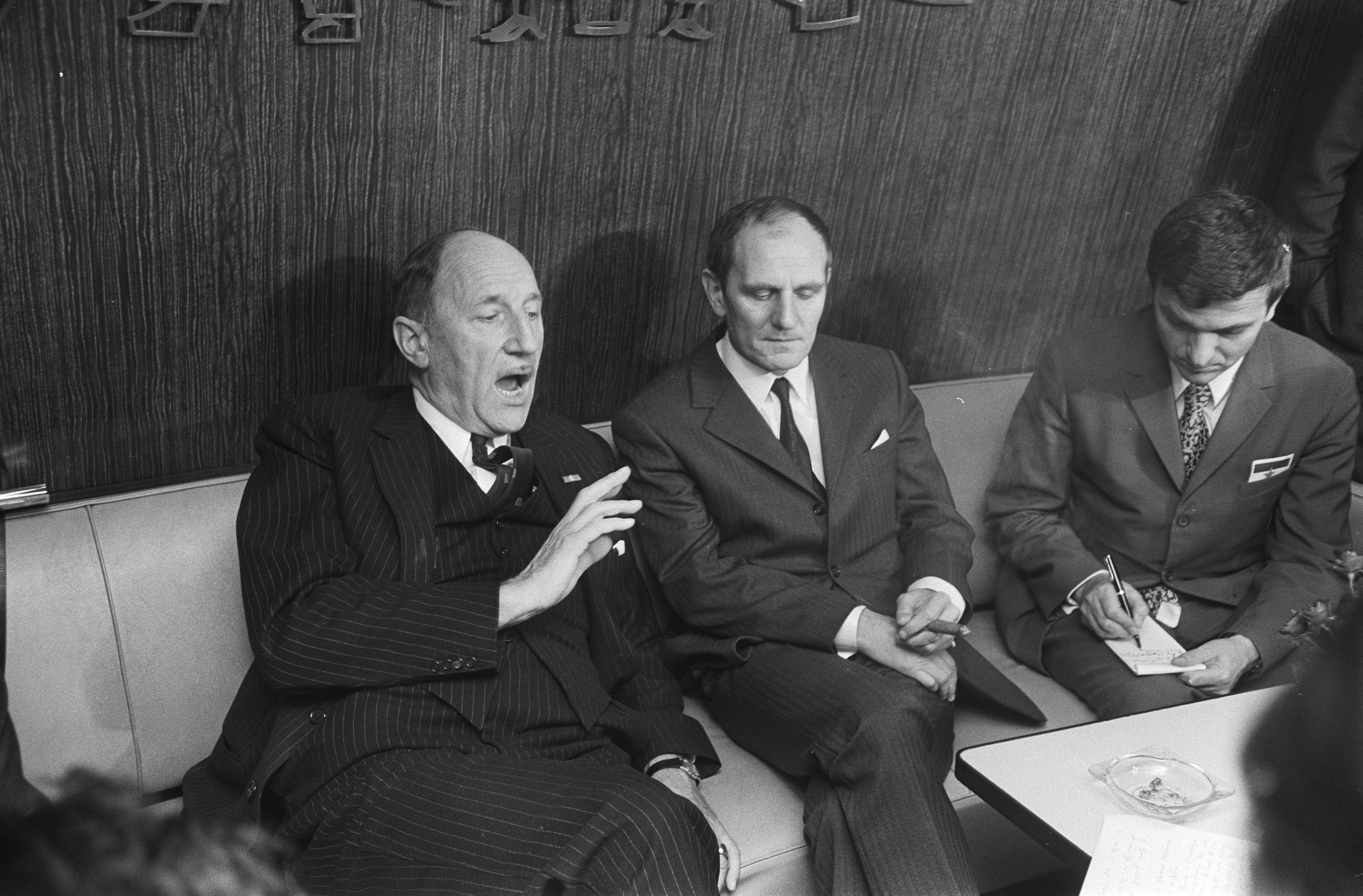 Collectie / Archief : Fotocollectie Anefo Reportage / Serie : Staatsbezoek President Tito van Joegoslavië Beschrijving : President Tito in Rotterdam Datum : 21 oktober 1970 Locatie : Rotterdam, Zuid-Holland Trefwoorden : presidenten, staatsbezoeken Persoonsnaam : Tito, Josip Broz Fotograaf : Fotograaf Onbekend / Anefo Auteursrechthebbende : Nationaal Archief Materiaalsoort : Negatief (zwart/wit) Nummer archiefinventaris : bekijk toegang 2.24.01.05 Bestanddeelnummer : 923-9501